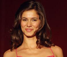 A actriz portuguesa Cláudia Vieira.